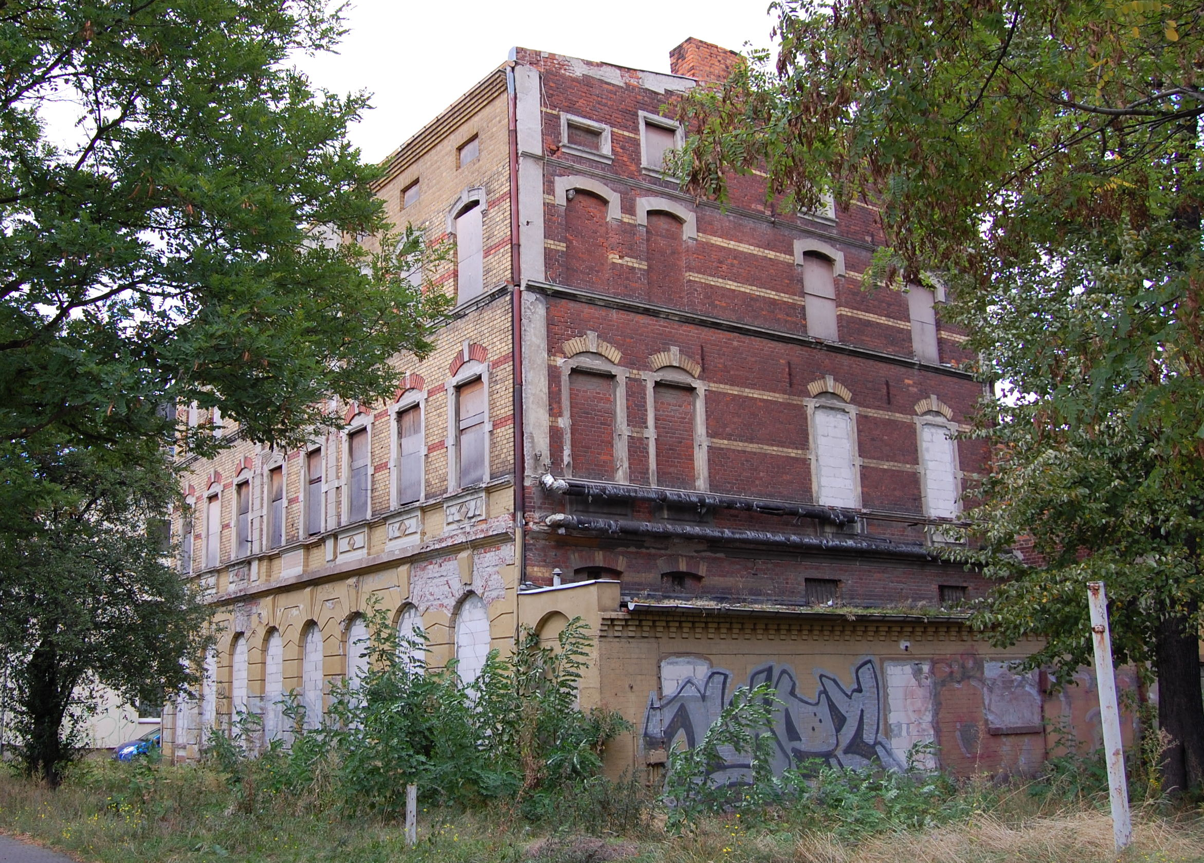 Baudenkmal Gaststätte Turmpark in Magdeburg-Salbke